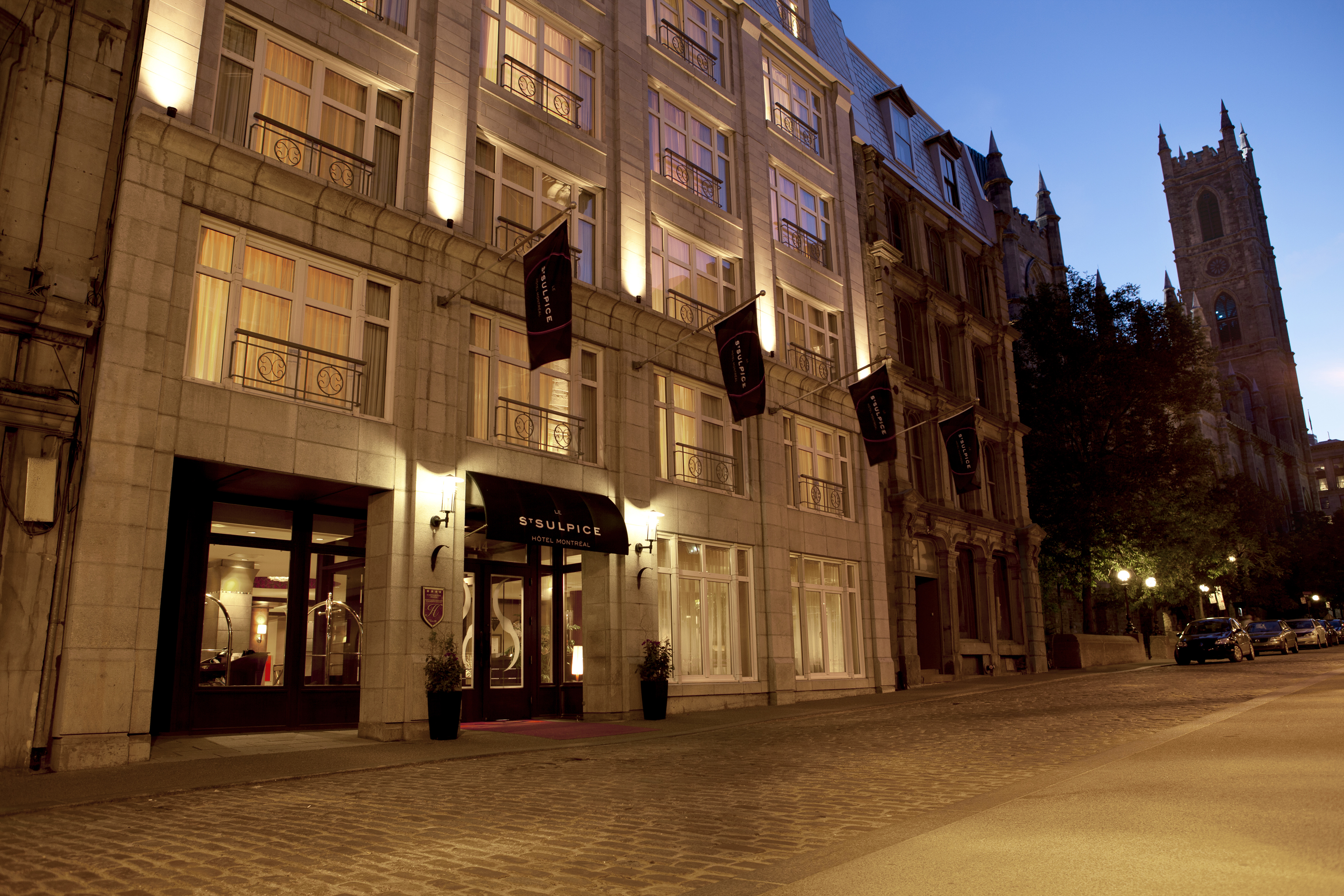 Le Saint Sulpice est un hôtel de charme au coeur du Vieux Montréal, quartier historique de la principale agglomération du Québec.